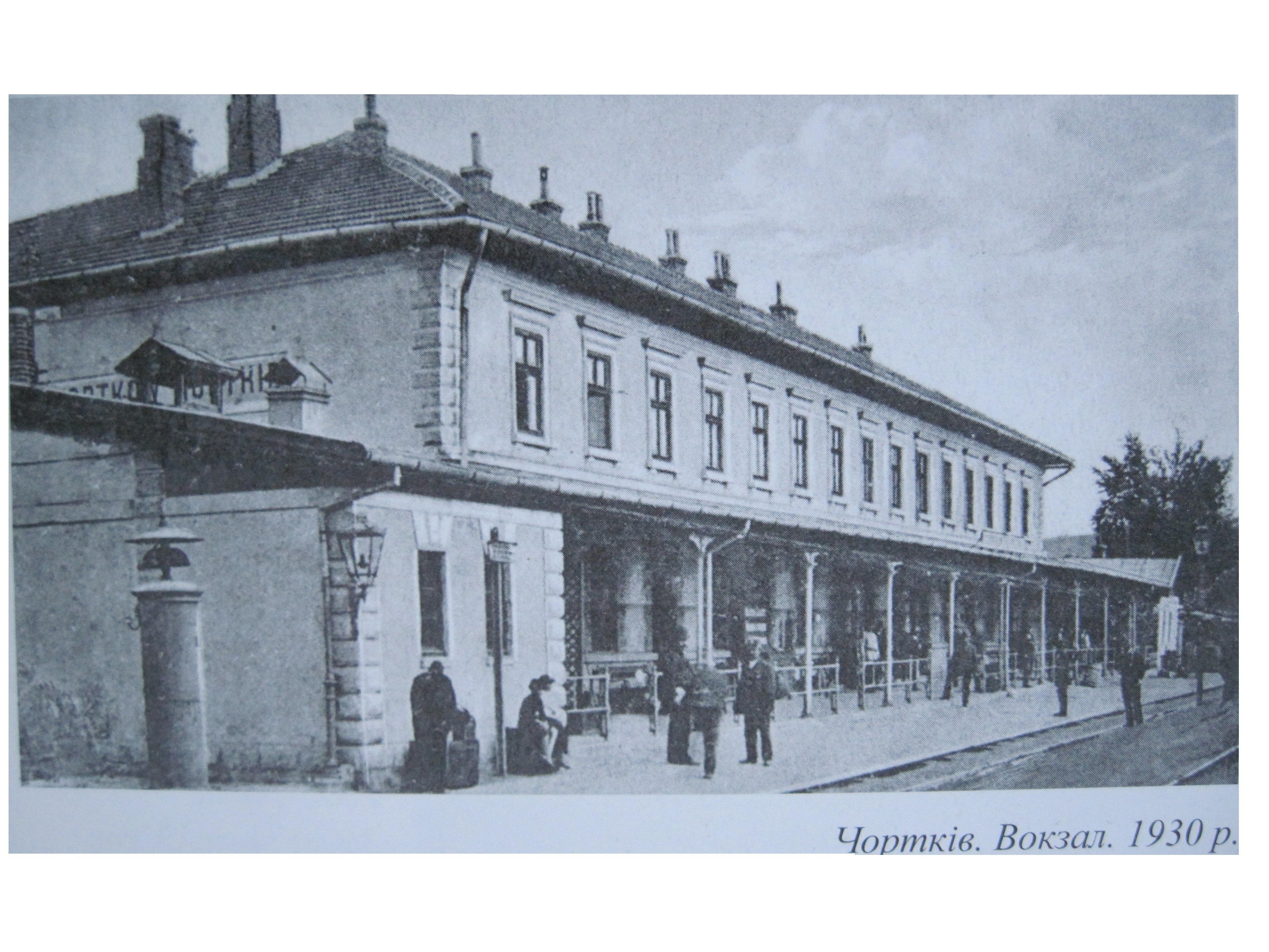 Залізничний двірець Чорткова, вихід на перон, 1930